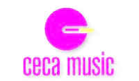 Logo Ceca Music